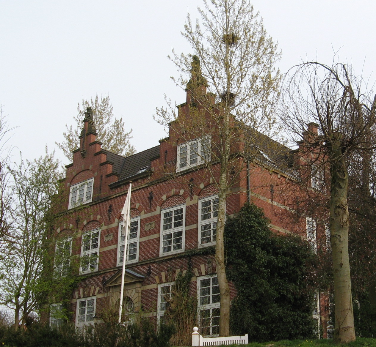 Ehemaliges Versammlungshaus der Remonstranten [nicht der Mennoniten; deren ehem. Schulgebäude befindet sich neben der Mennonitenkirche/Alten Münze am Mittelburggraben] Author: Dirk Ingo Franke